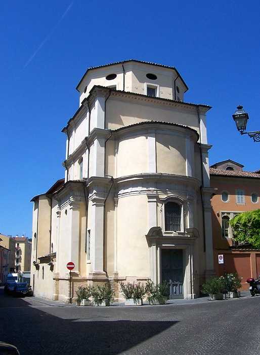 Parma - Oratorio di S. Maria delle Grazie